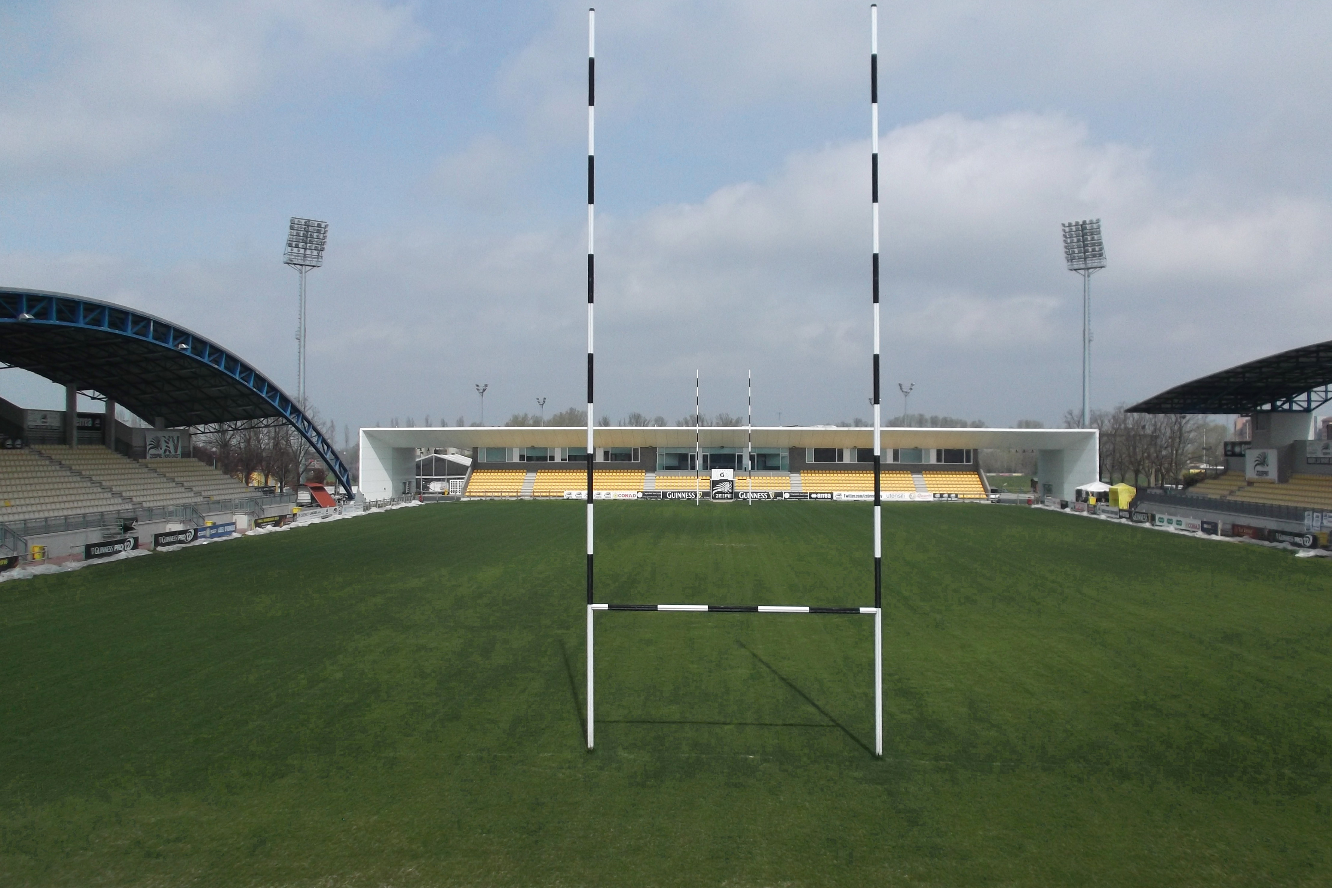 Stadio Sergio Lanfranchi in Parma - North stand